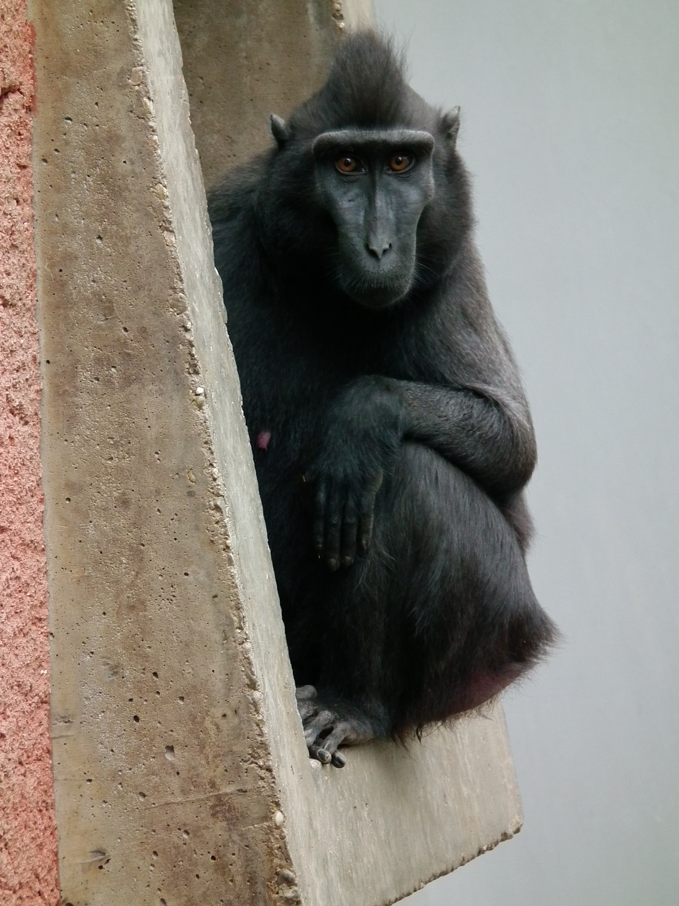 Schopfmakak (Macaca nigra) im Vivarium Darmstadt (Hessen, Deutschland)